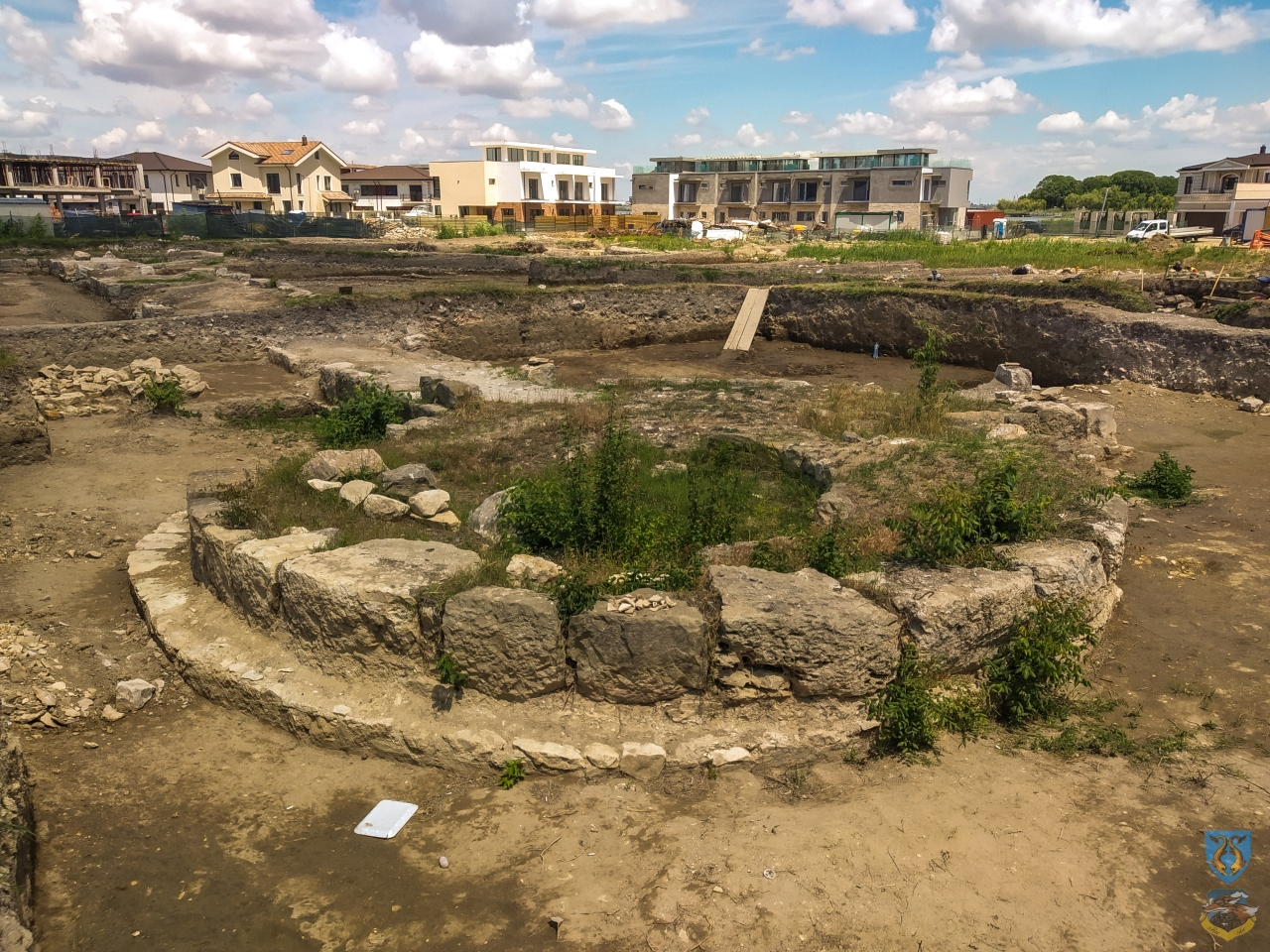 Așezare 02